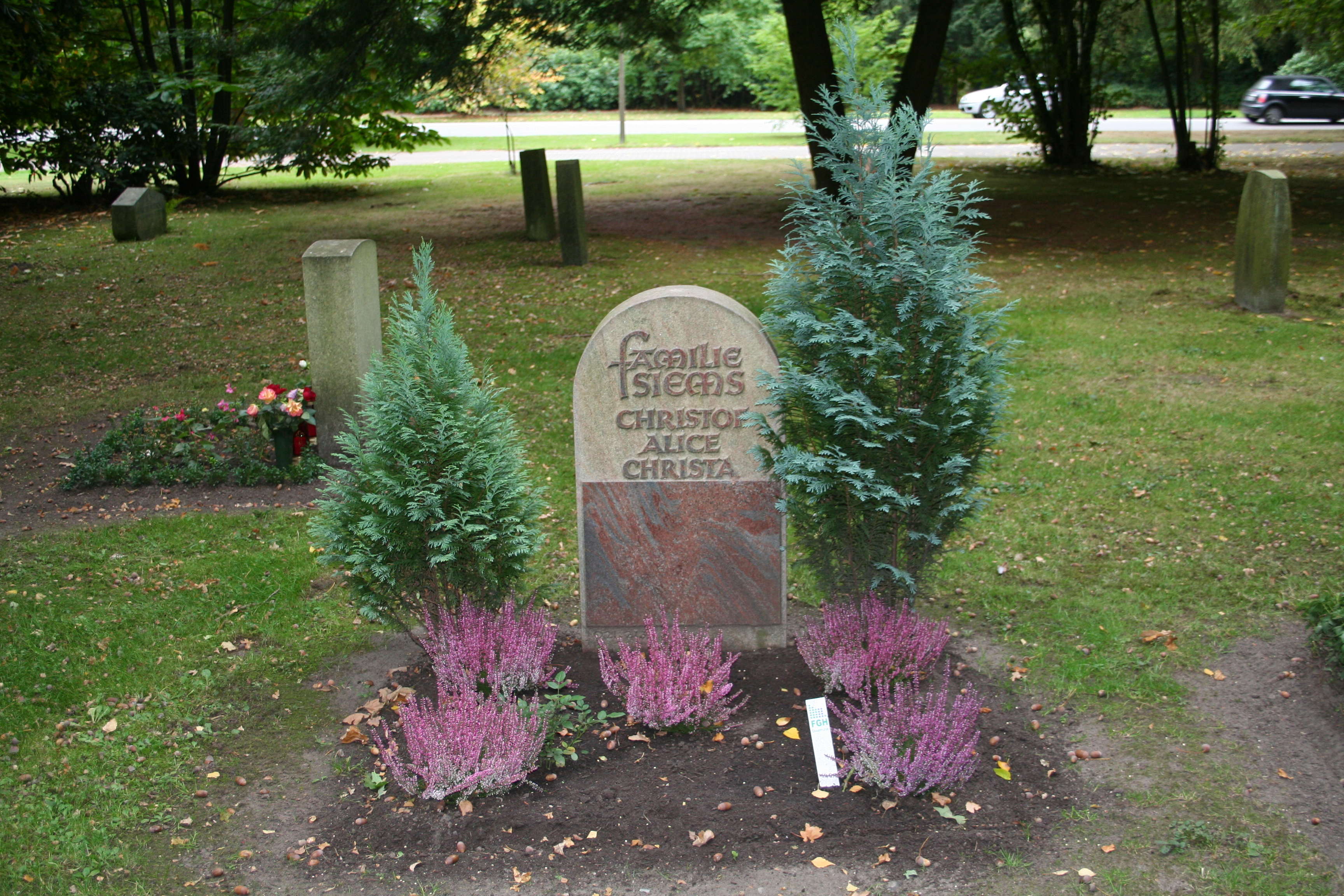 Christa Siems wurde am 28. Mai 1916 geboren; über ihren Geburtsort ist ebenso wenig bekannt wie über ihren Werdegang zur populären Volksschauspielerin.